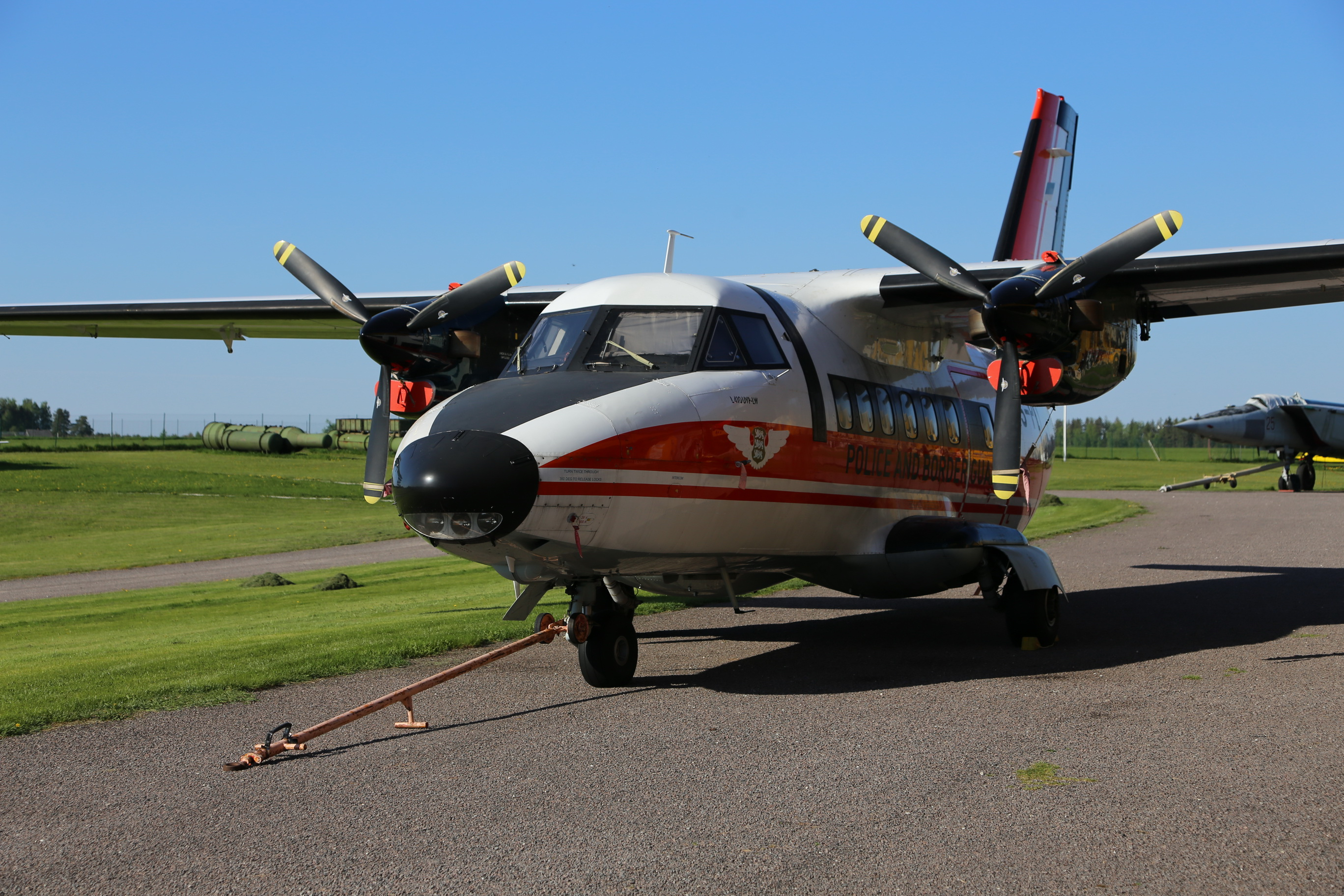 Let L-410 Eesti Lennundusmuuseumis.